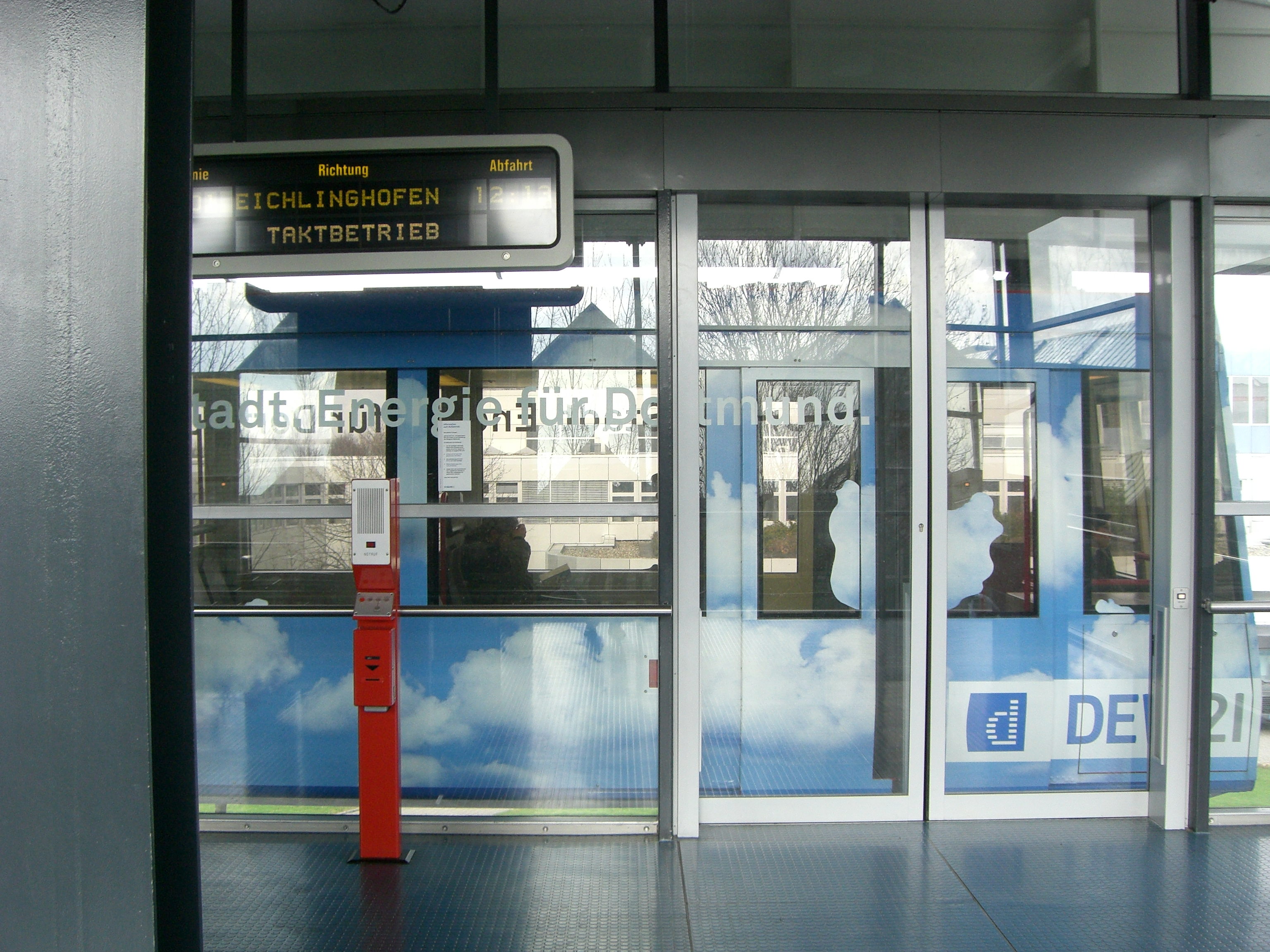 Dortmund H-Bahn Haltestelle Technologiezentrum Innenansicht mit Bahn